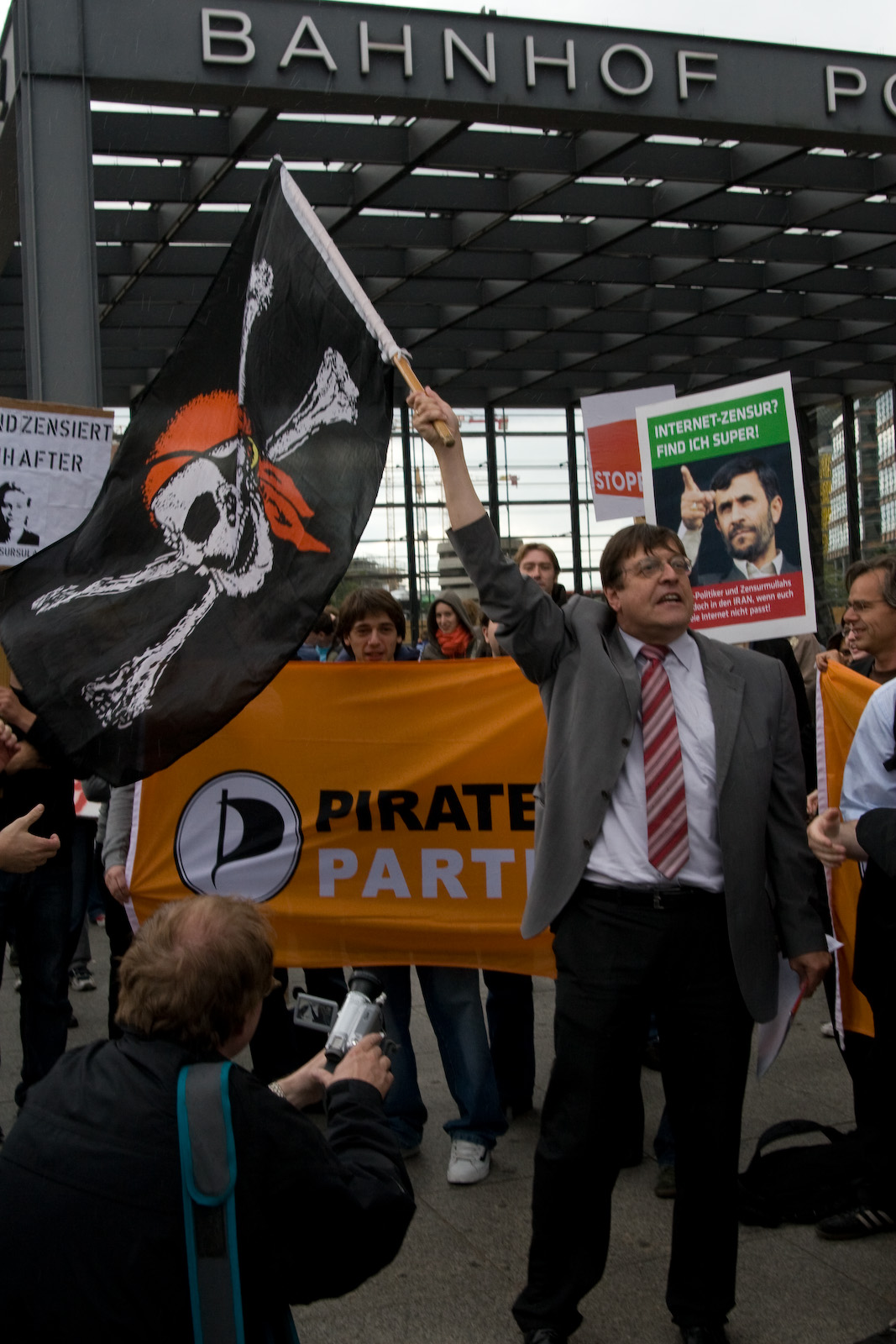 Demo gegen Internetsperren, Berlin, 20.06.2009.